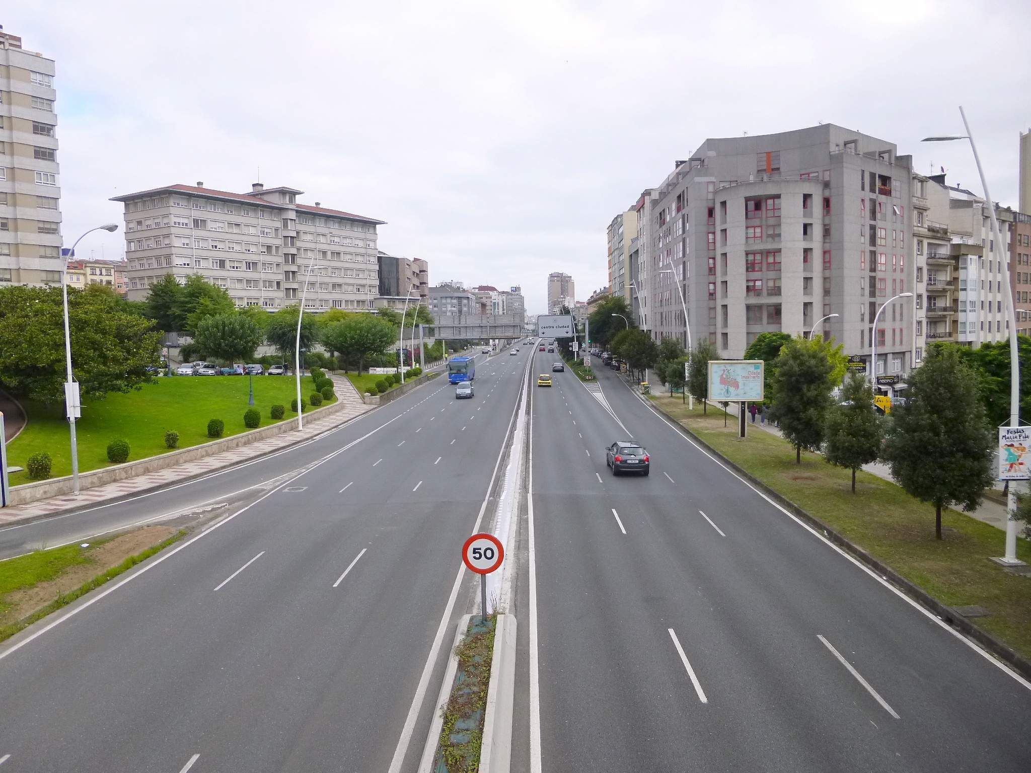 A Coruña